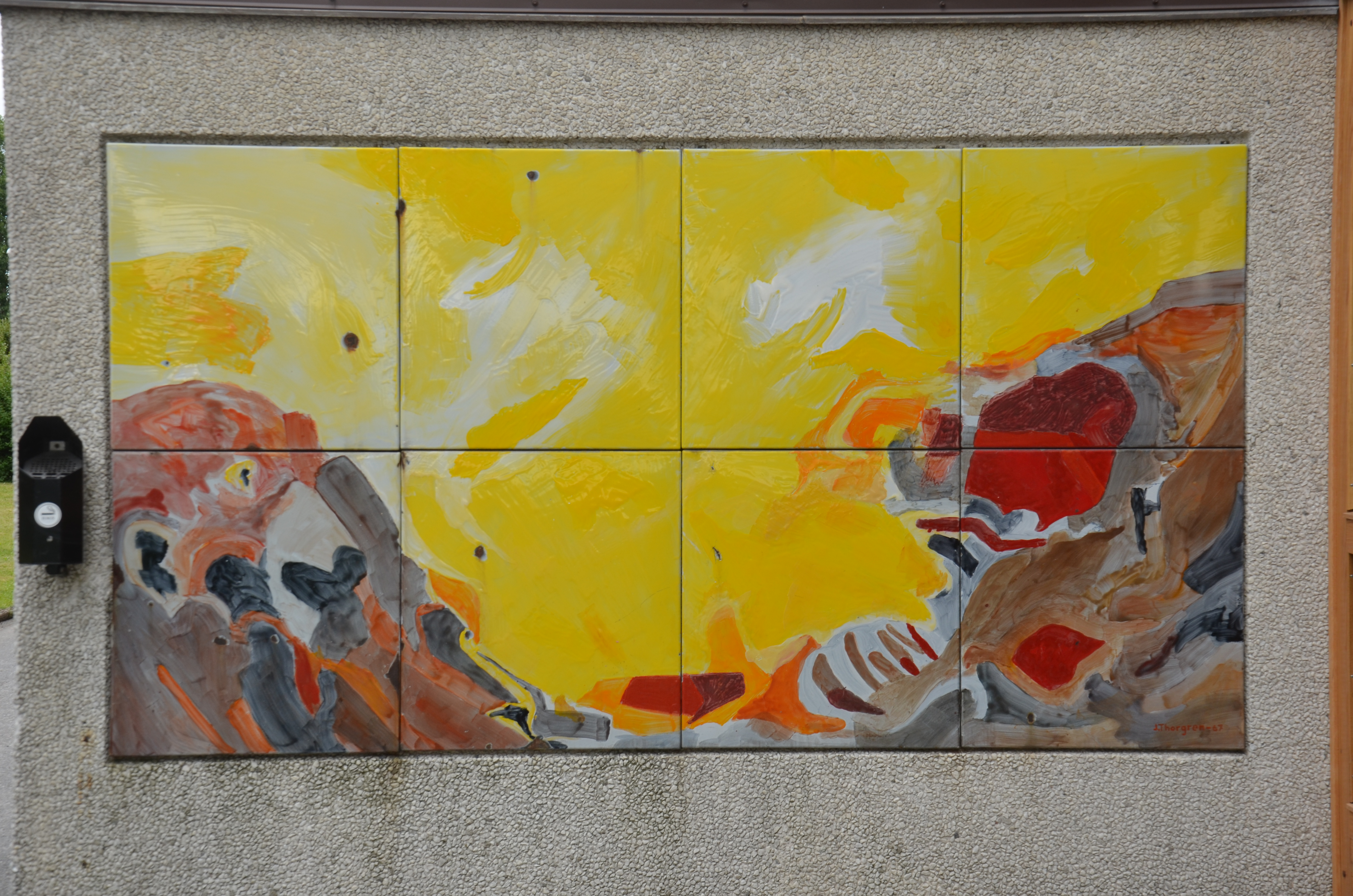 Emaljmålning av John Thorngren på Morupsgränd 11 i Östberga i Stockholm